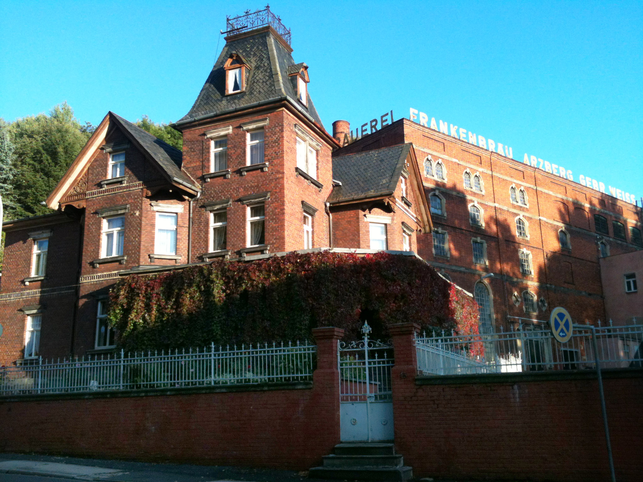 Brauerei Frankenbräu, Rohziegelbau mit barock-klassizistischen Formelementen; zugehörige Villa, Rohziegelbau mit Turm und Holzlaube, um 1905; Einfriedung.This is a photograph of an architectural monument.